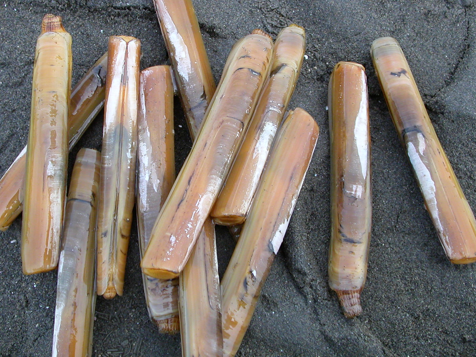 Solen strictus.jpg(マテガイ)